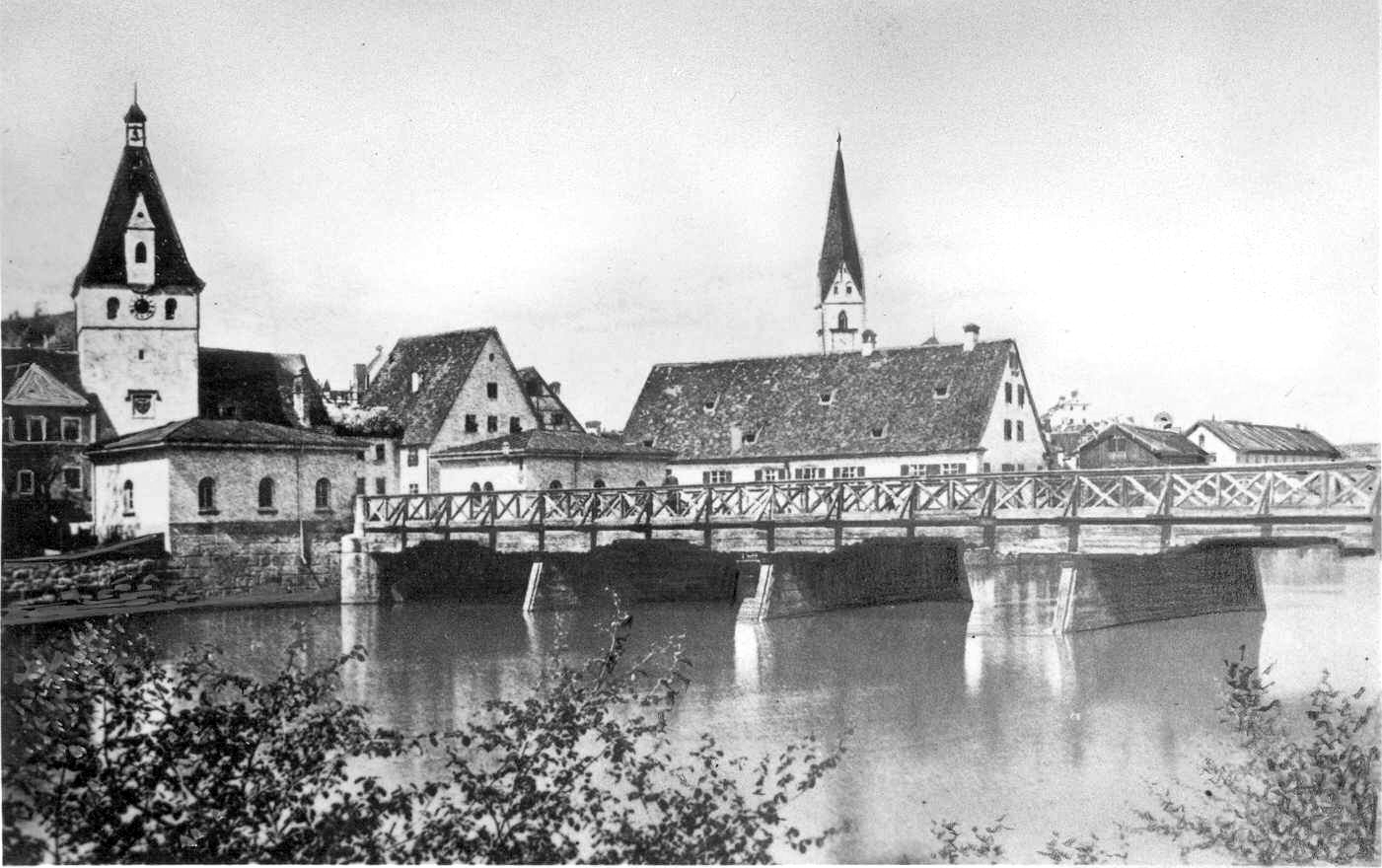 Hist. Illerbrücke in Kempten